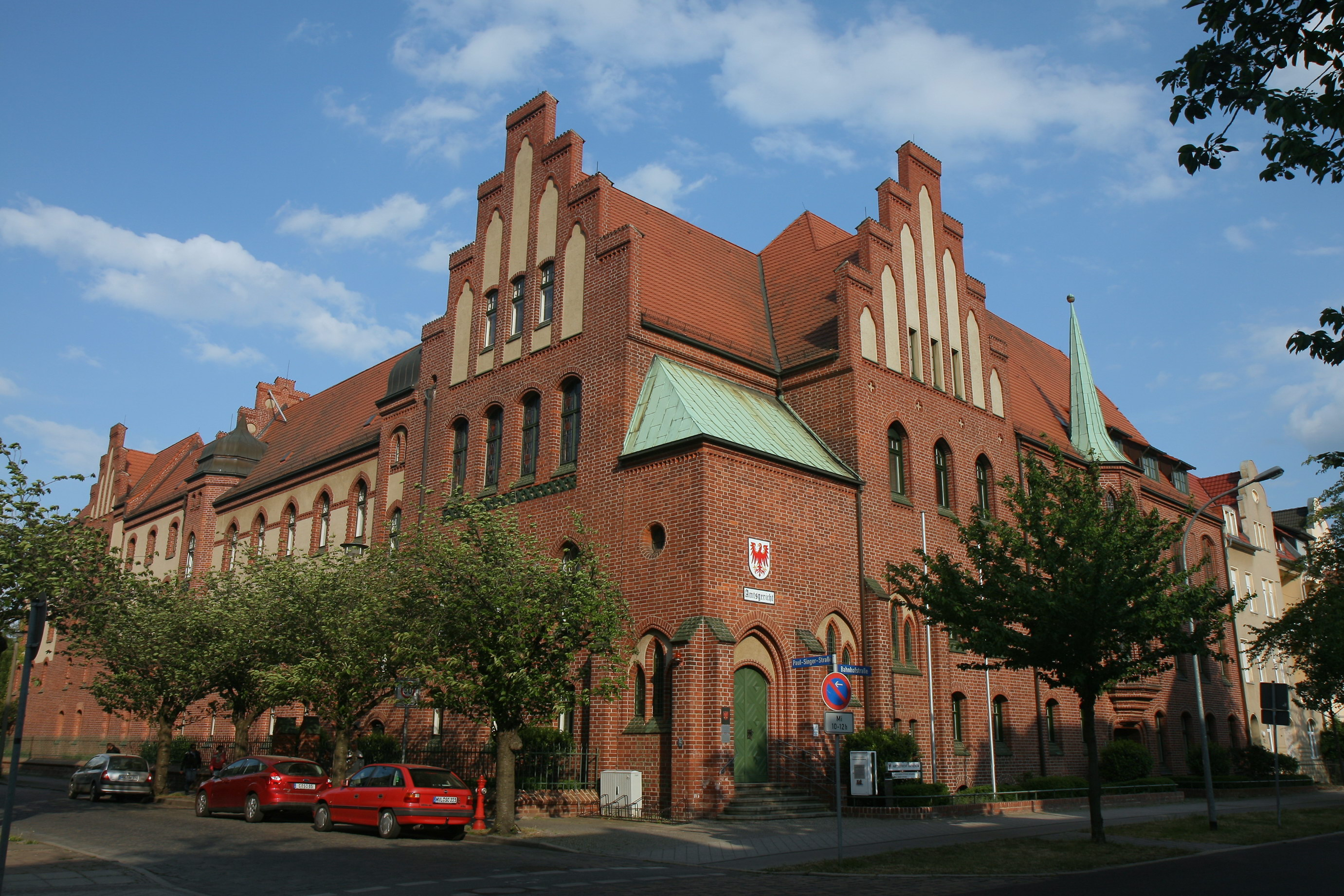 Amtsgericht Rathenow, Bahnhofstraße 19 in Rathenow. Denkmal-ID-Nr. 09150277.